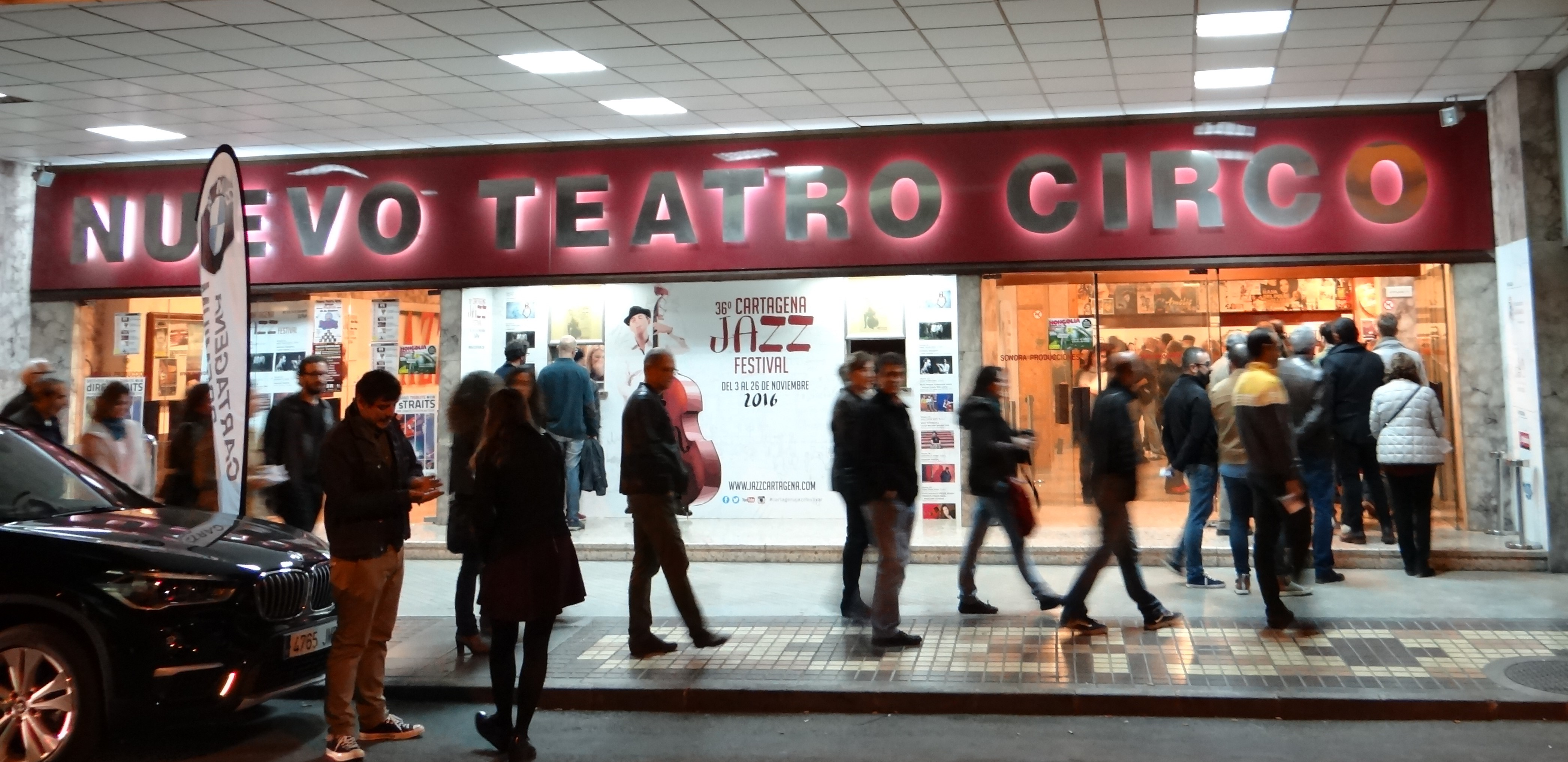 Exterior del Nuevo Teatro Circo de Cartagena (España) antes de la actuación de Avishai Cohen